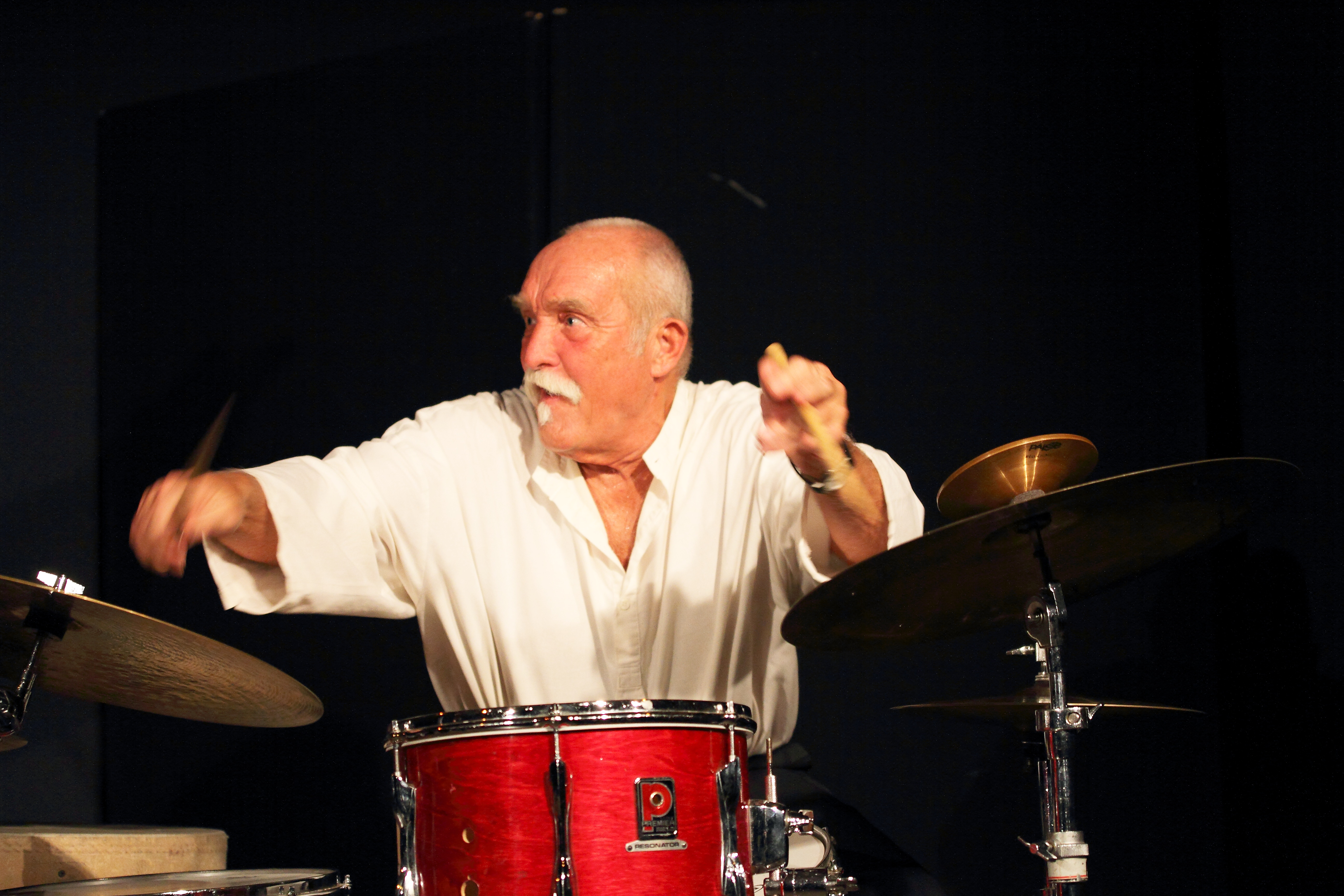 Ulrich Gumpert (Klavier) und Günter "Baby" Sommer (Schlagzeug) mit dem Programm "La Paloma - Das donnernde Leben" im KULT, Niederstetten.